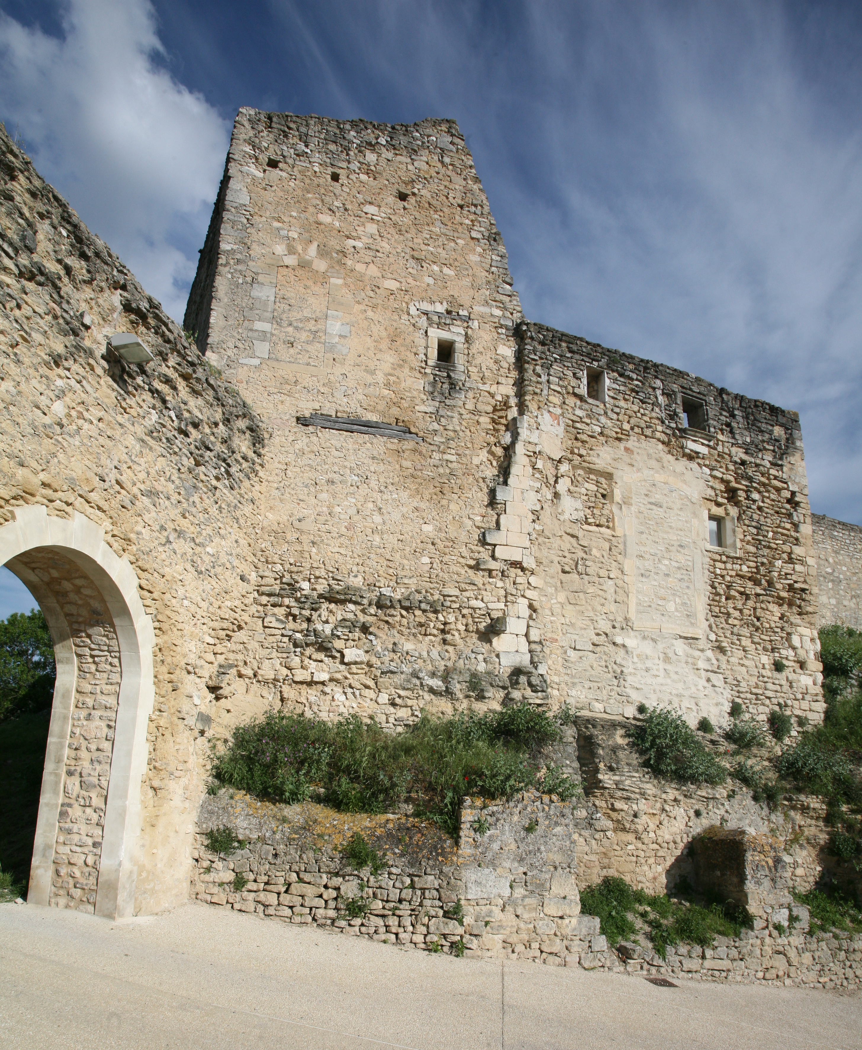 village of Lagnes Vaucluse, France